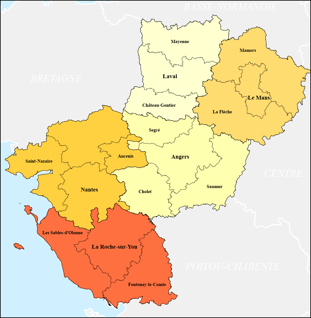 Arrondissements